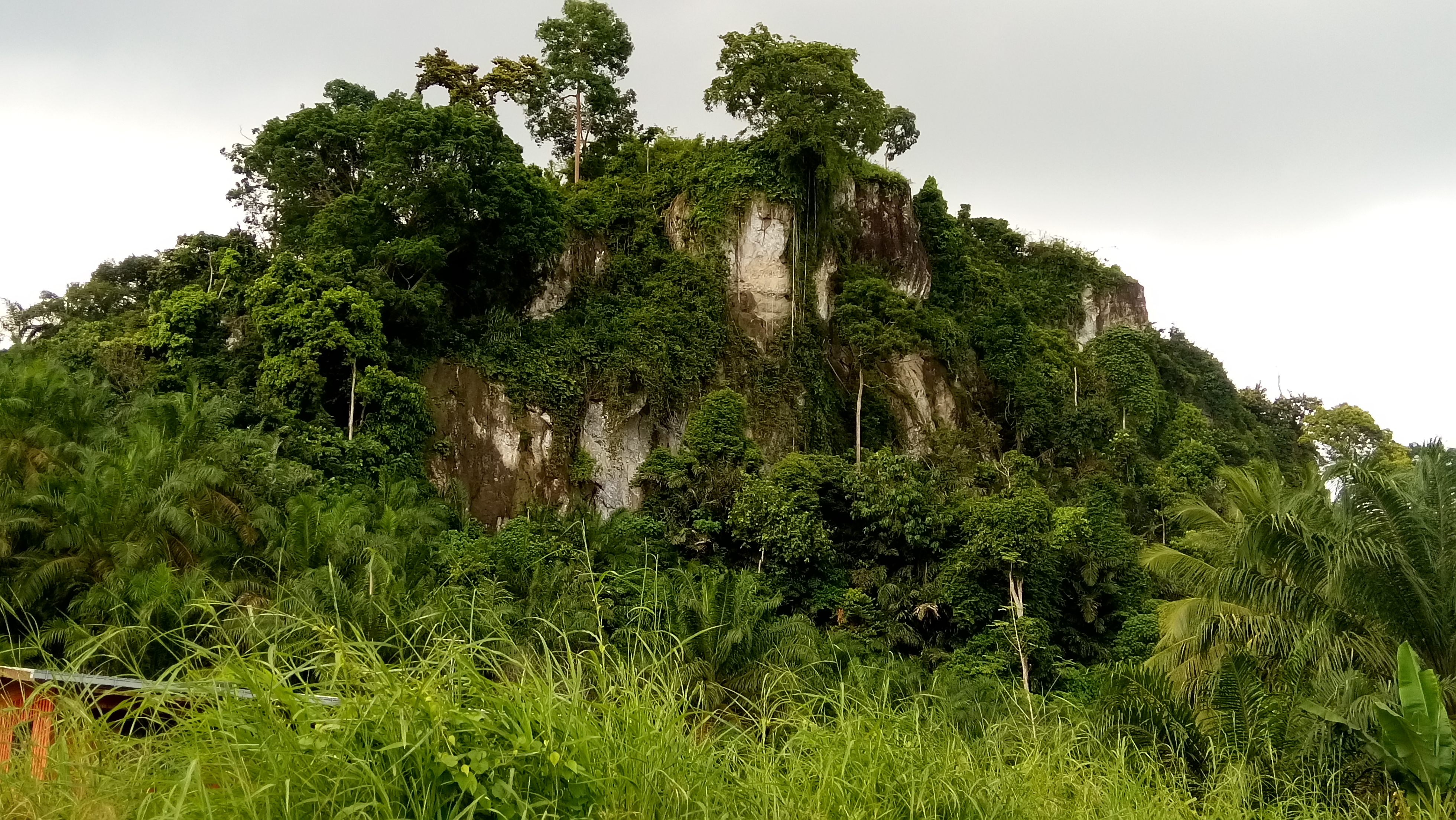 Bukit Belacon terletak di Segama, Lahad Datu, Sabah